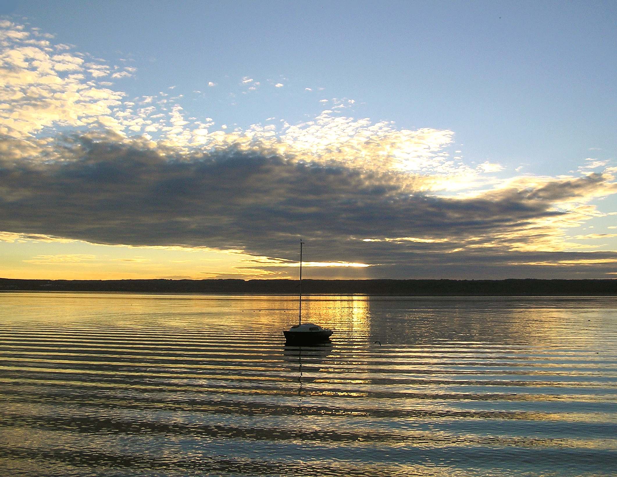 Abendstimmung am Ammersee. Landschaftsschutzgebiet „Ammersee-West“, LSG-00509.01.